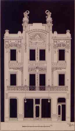 Alojz Bastl- Kuća Pečić (apoteka K Svetom Trojstvu), Ilica, Zagreb